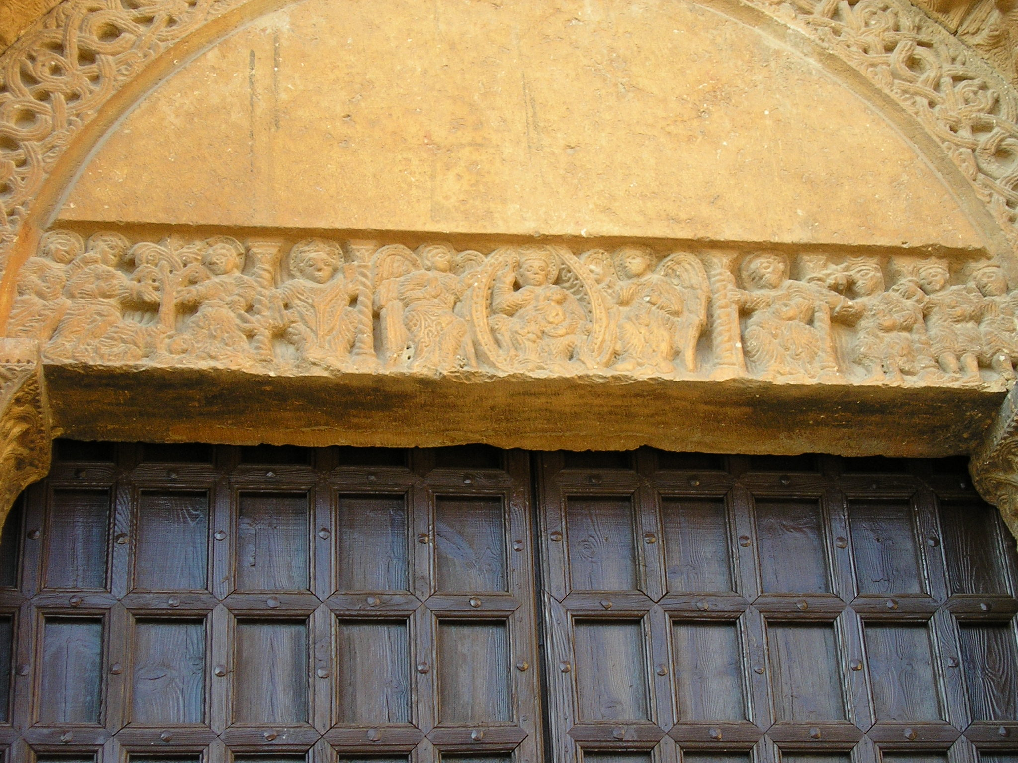 Pla de Santa Maria - Iglesia de Sant Ramon Penyafort (Detall